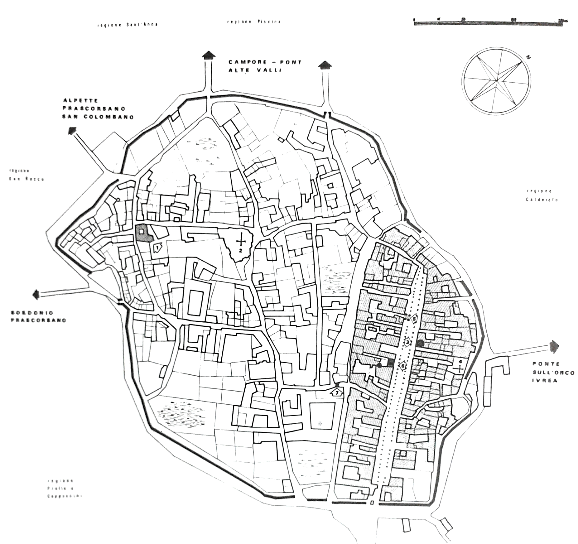 Riproduzione mappa trecentesca dell'abitato del comune di Cuorgnè (TO).